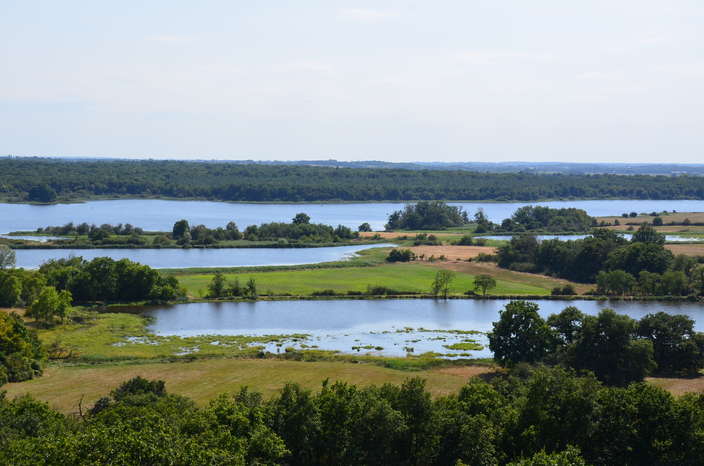 Une partie de l'étang de la Mer rouge vu depuis la terrasse du château.